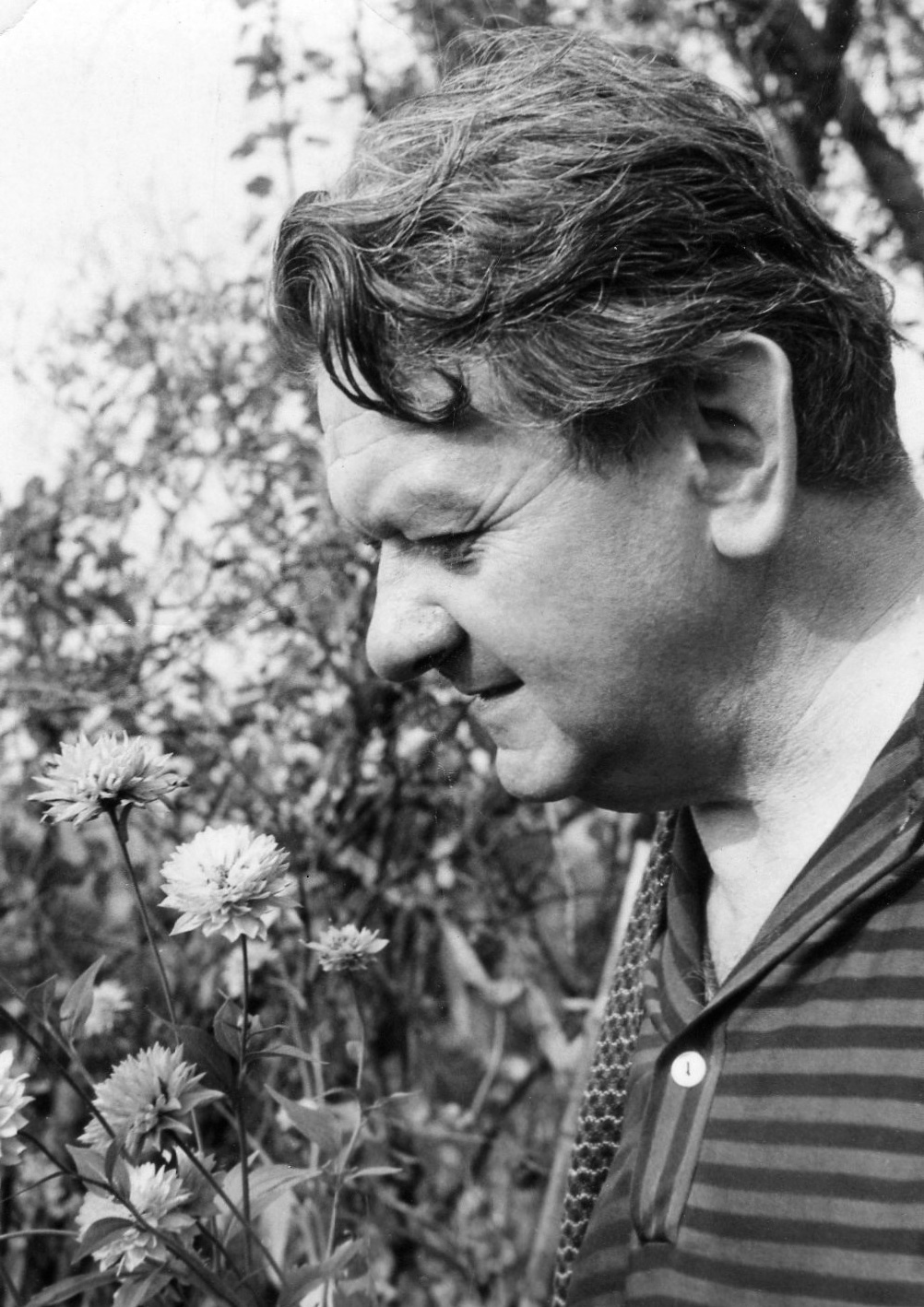 Kamil Bednář, český spisovatel, básník , dramatik a spisovatel